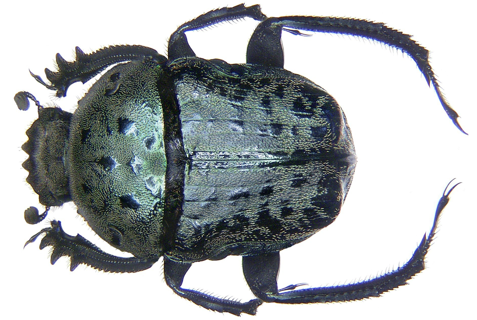 Familie: Scarabaeidae Grösse: 14,5 mm Fundort: Nepal, Annapurna Region, Pokhara, 900 m leg. A.Skale, 2000; det. Schönfeld Foto: U.Schmidt, 2007